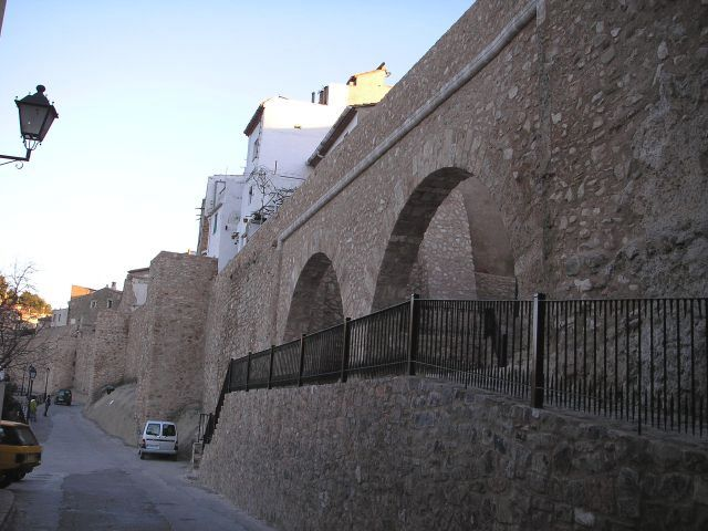 Vista de la muralla y el acueducto medieval de Segorbe (España)